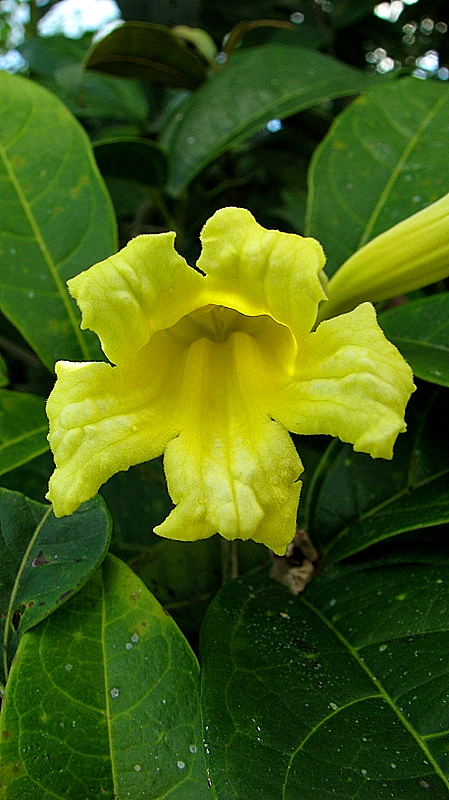 Adenocalymma coriaceum